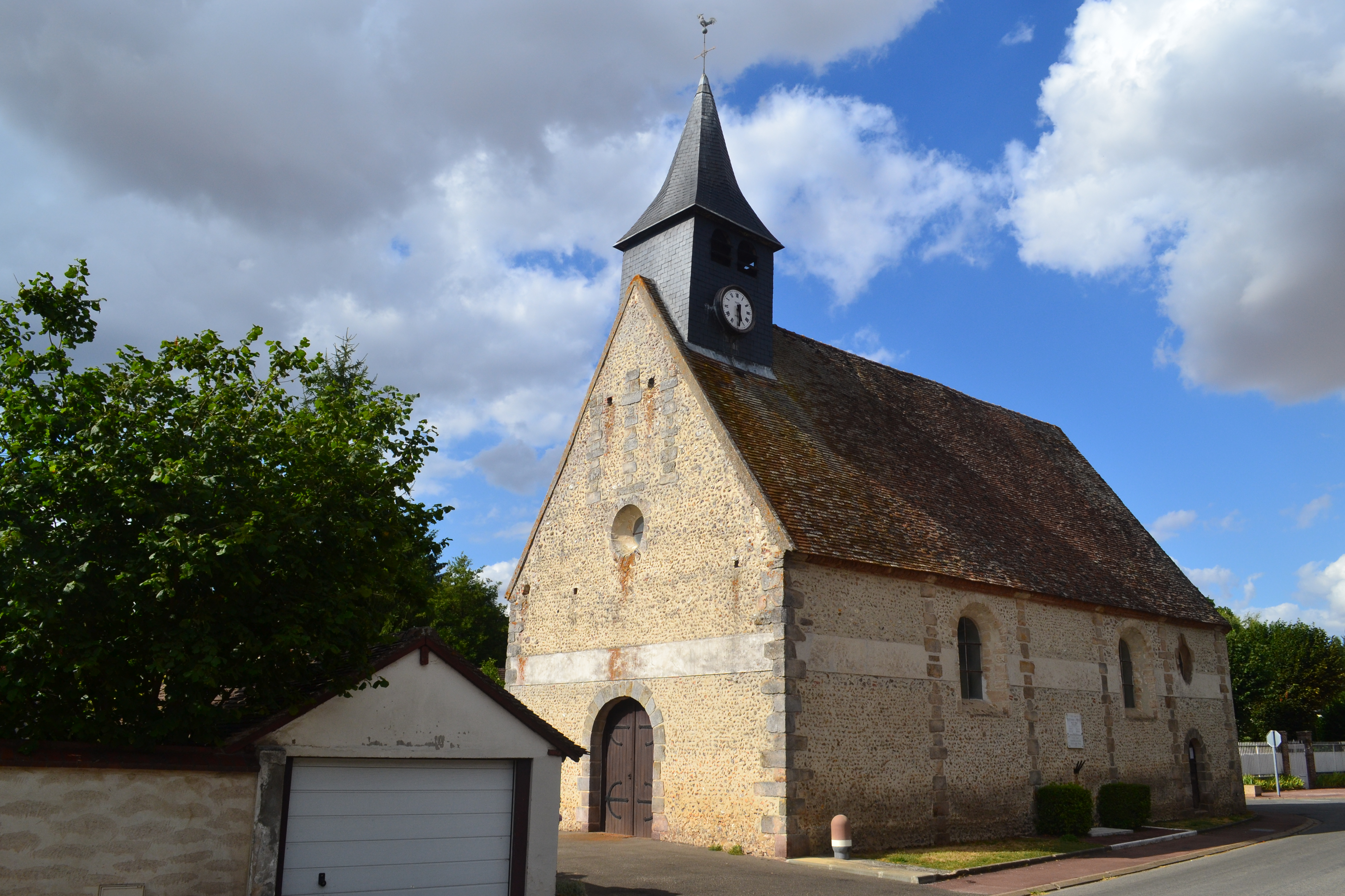 L'Église d'Écluzelles côté sud.